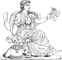 Musa Clío Dr. Vollmer's Wörterbuch der Mythologie aller Völker. Stuttgart: Hoffmann'sche Verlagsbuchhandlung, 1874.